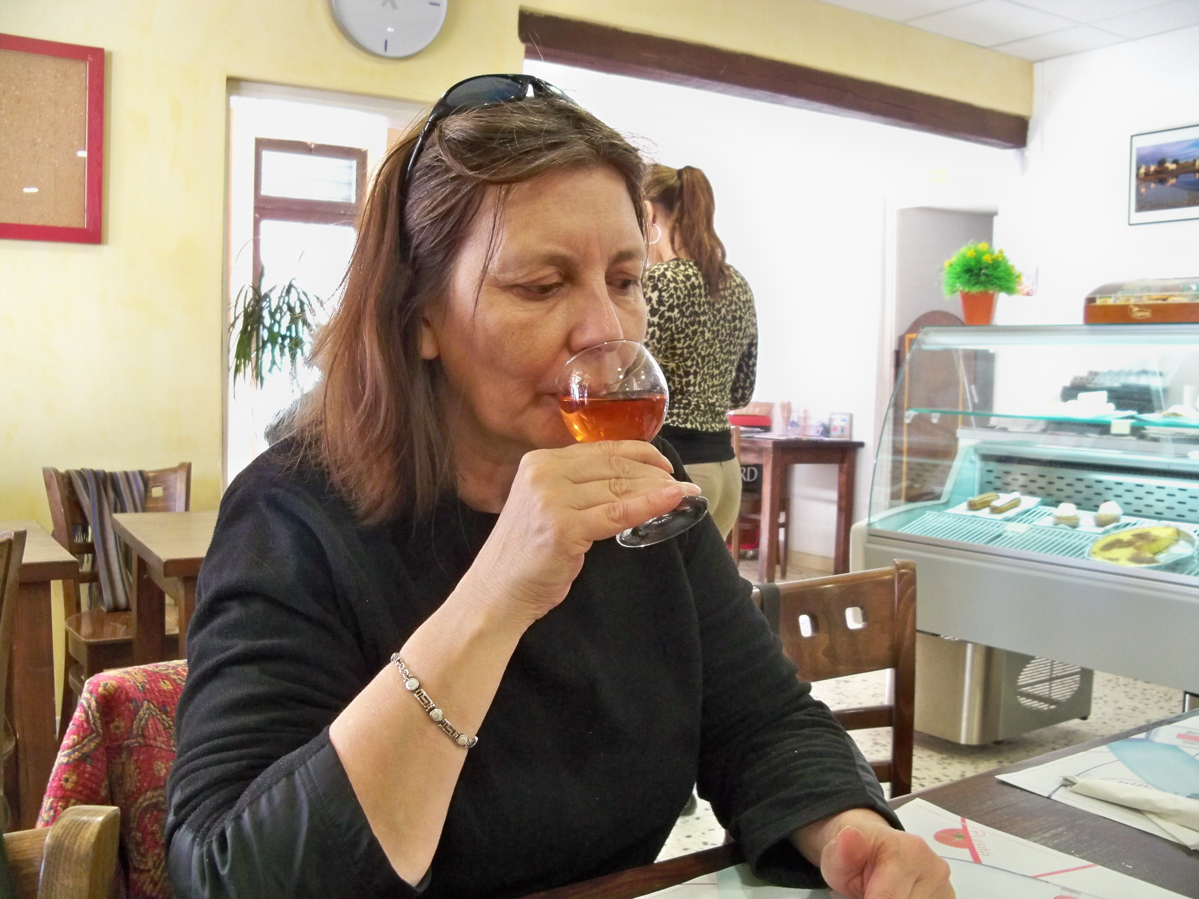 Degustation - lamper